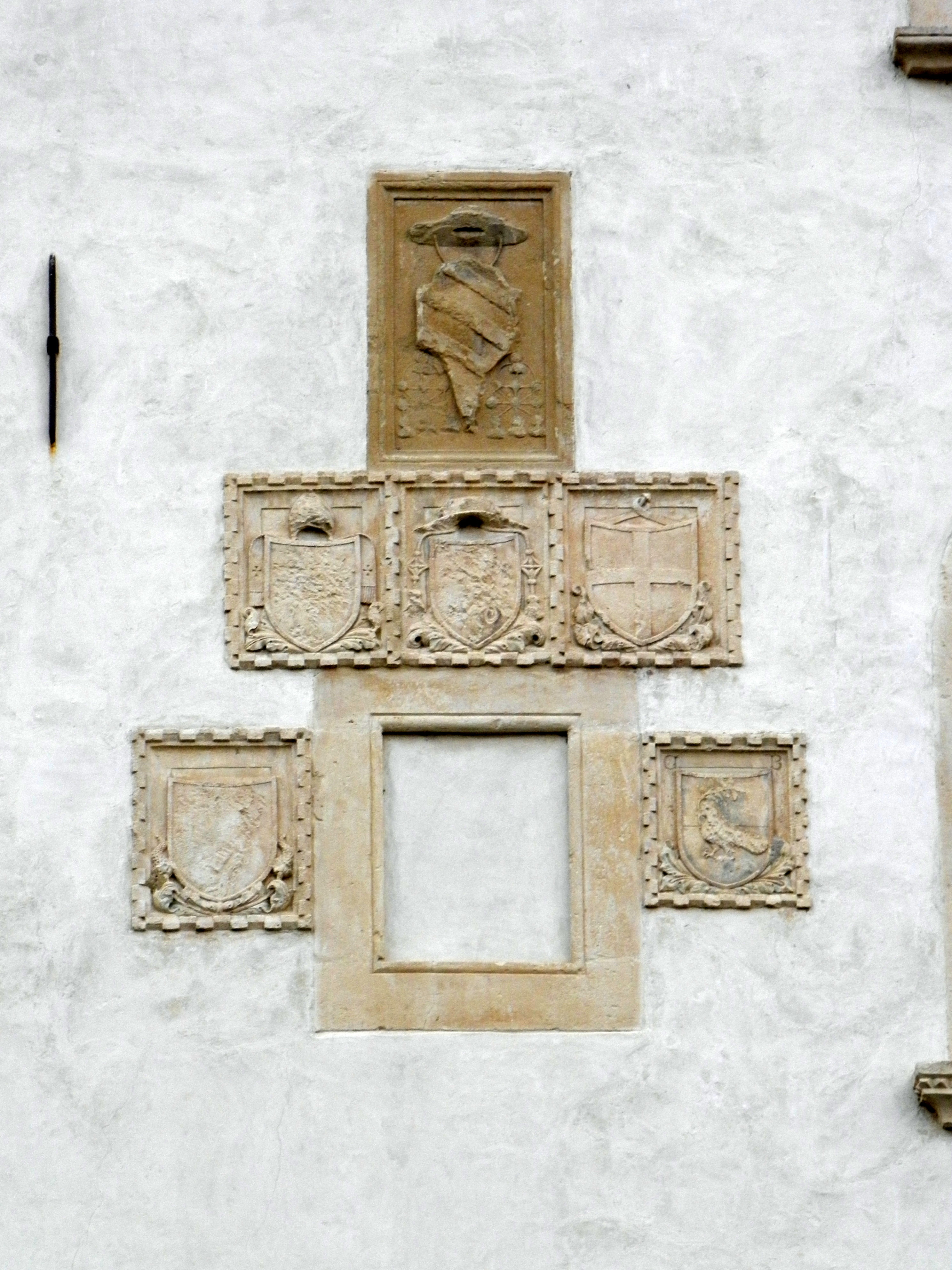 Barbarano Vicentino: Palazzo dei Canonici